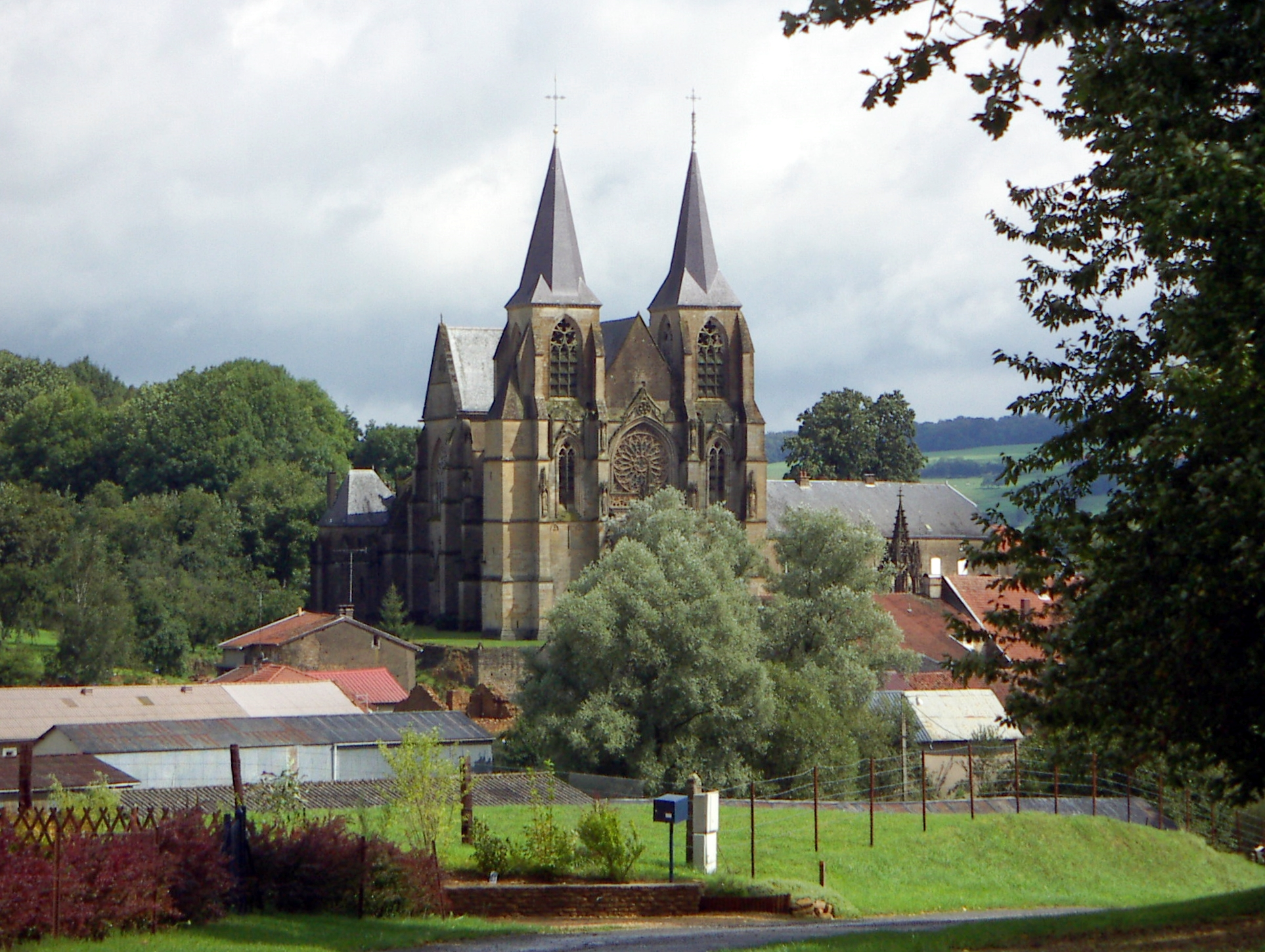 Basilique Notre-Dame d'Avioth, France, Meuse